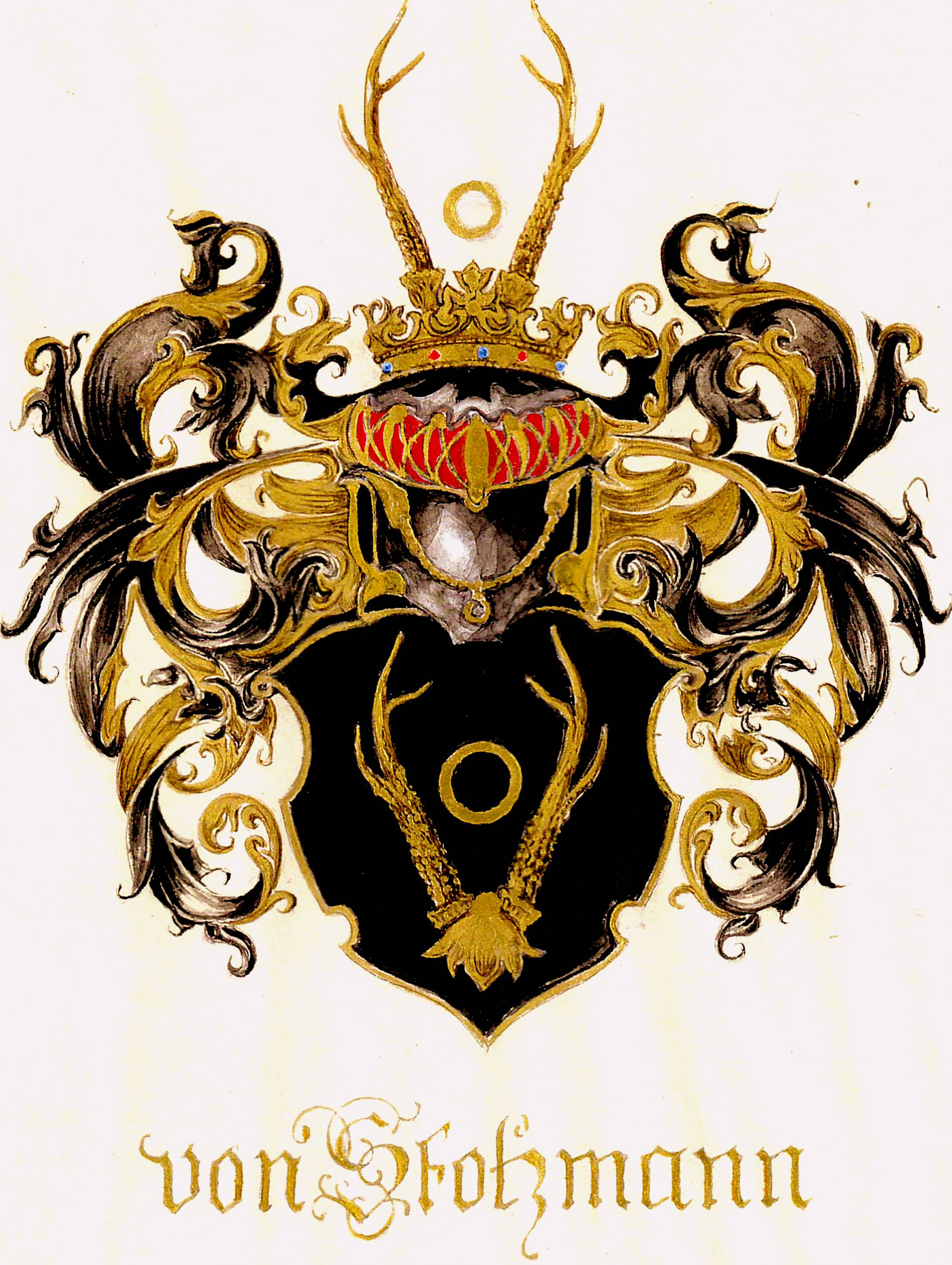 Das Wappen der Familie von Stolzmann. Die vielen Ringe im Wappen symbolisieren je einen geschlossenen Kreis, die den Zusammenhalt und die Verbundenheit der Familiengemeinschaft skizzieren. Da der Kreis bekanntlich auch ein Symbol für Einheit und Vollkommenheit ist und damit viele Aspekte von kirchlichen Symboliken beinhaltet, zeigt der Kreis die Gläubigkeit der Familienmitglieder.